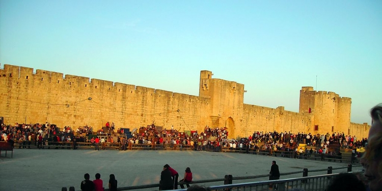 Plan des arènes d'Aigues-Mortes (gard)